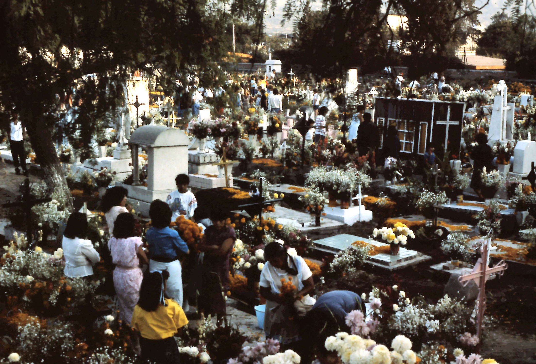 Fotografía antigua de la Ciudad de México resguardadas por el Museo Archivo de la Fotografía (MAF) de la Ciudad de México